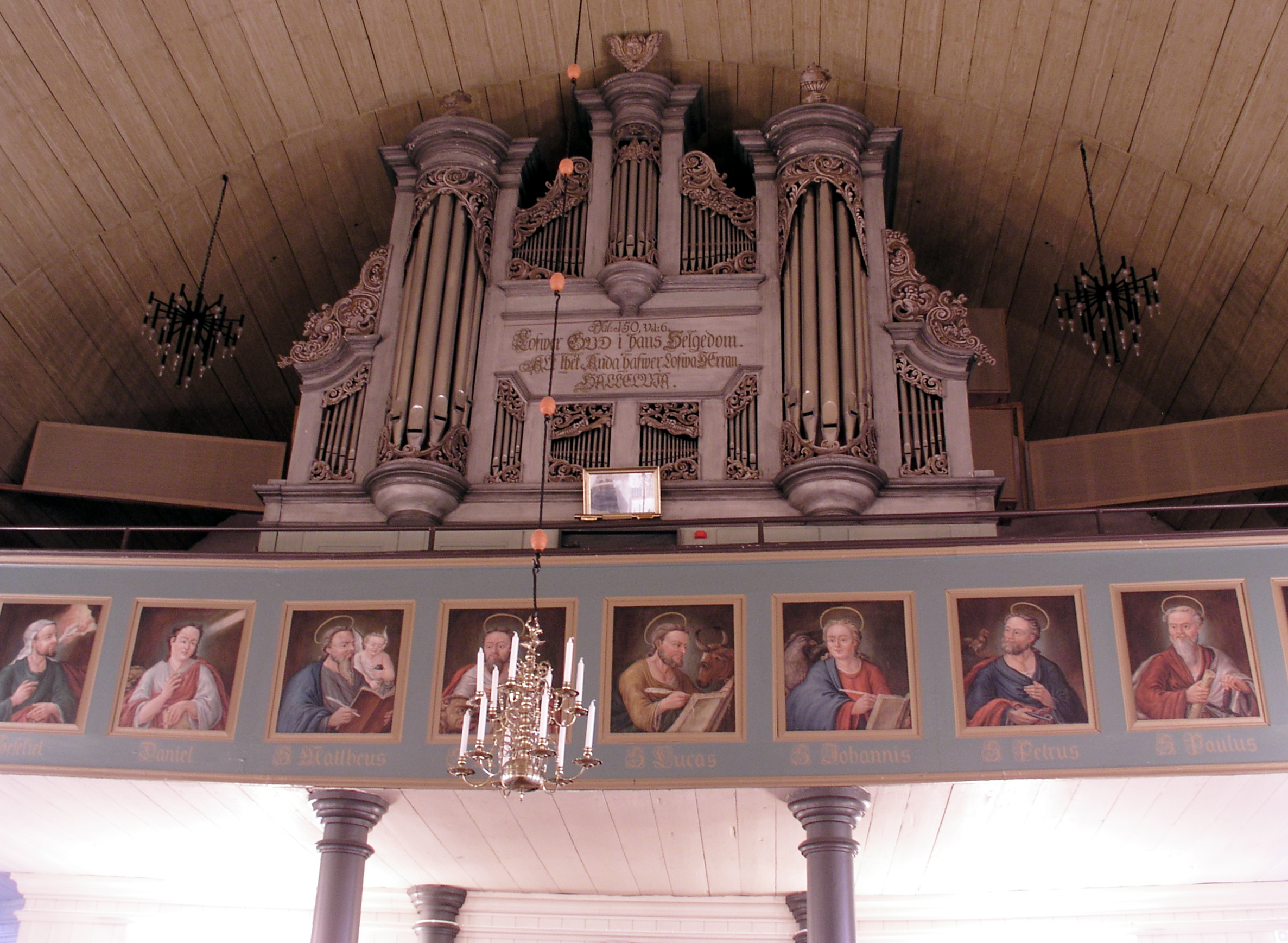 Östra Ryds kyrka, Söderköpings kommun. Organ. The photo was taken the 2nd October 2005 by Håkan Svensson (Xauxa).